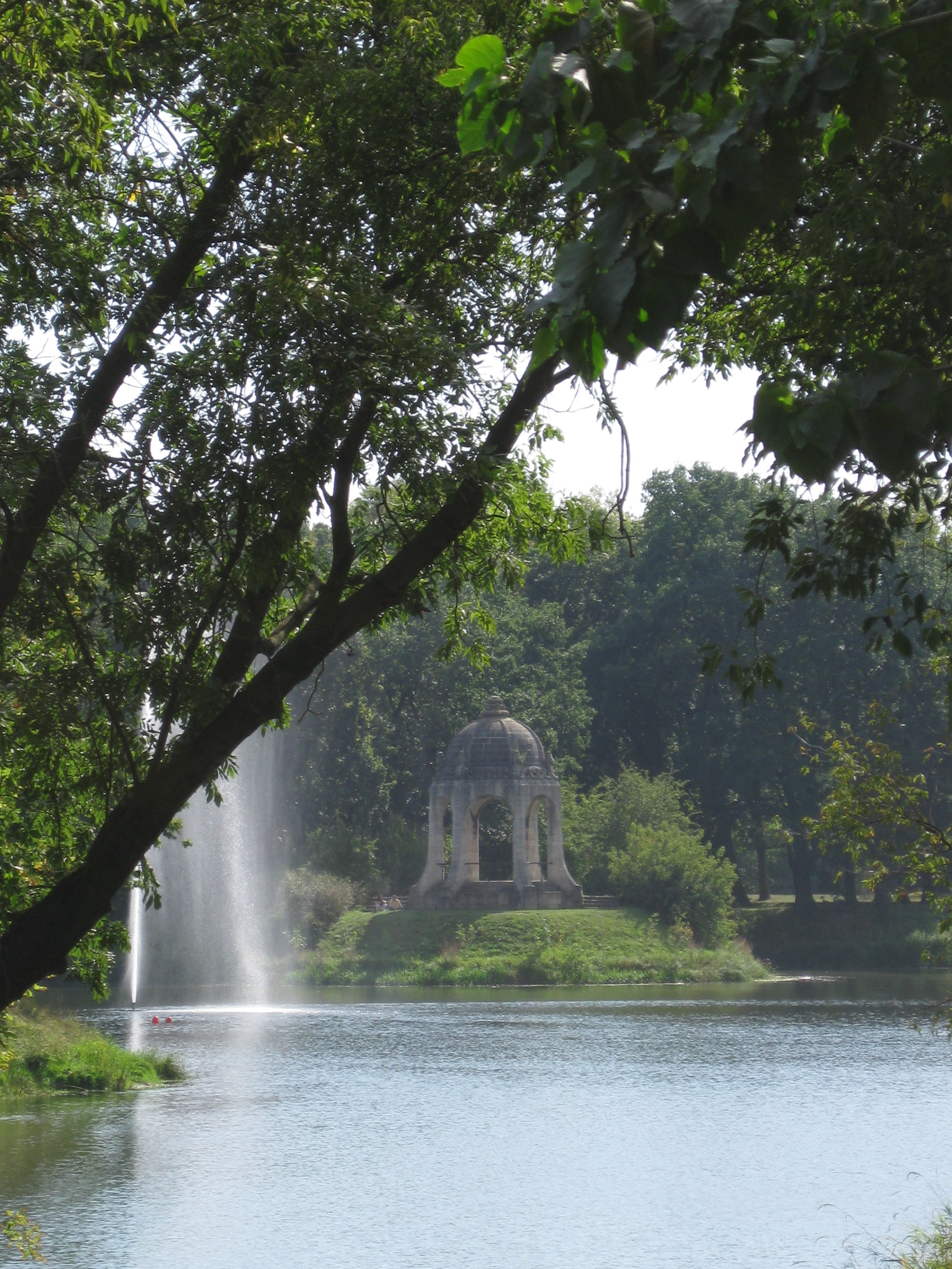 Adolf-Mittag-See in Magdeburg, in der Mitte der Marientempel